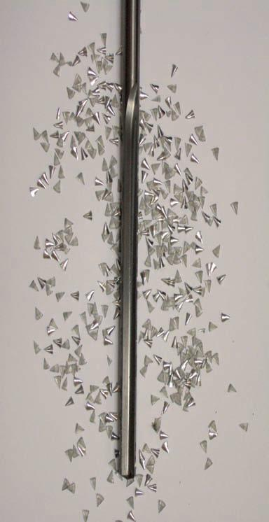 foret 3/4 pour perçage profond et copeaux fragmentés grâce au procédé de perçage vibratoire